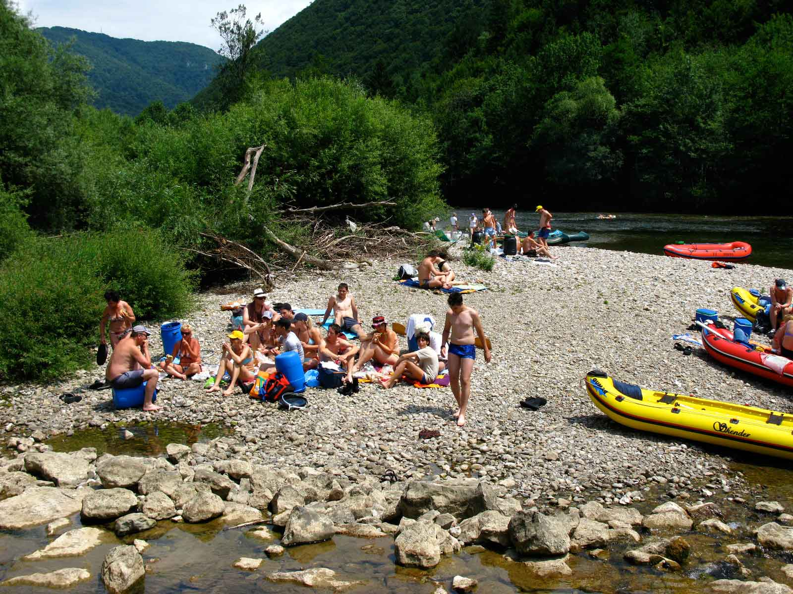 naštimali so se čez naše brisače in se jim sploh ni zdelo čudno. puseram-se por cima das nossas toalhas e n/ pensaram nada estranho.